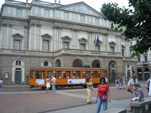 Театр Ла Скала в Милане